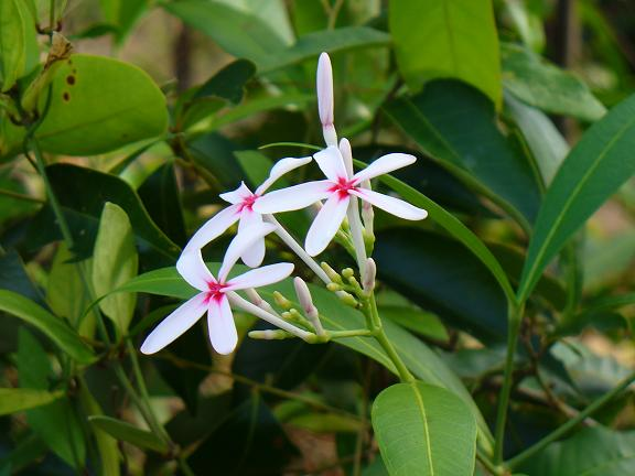 Kopsia fruticosa, Apocynaceae - Kambodscha/Cambodia, bei den Stromschnellen (rapids) des Flusses Tek Chhou N Kampot (Prov. Kampot)